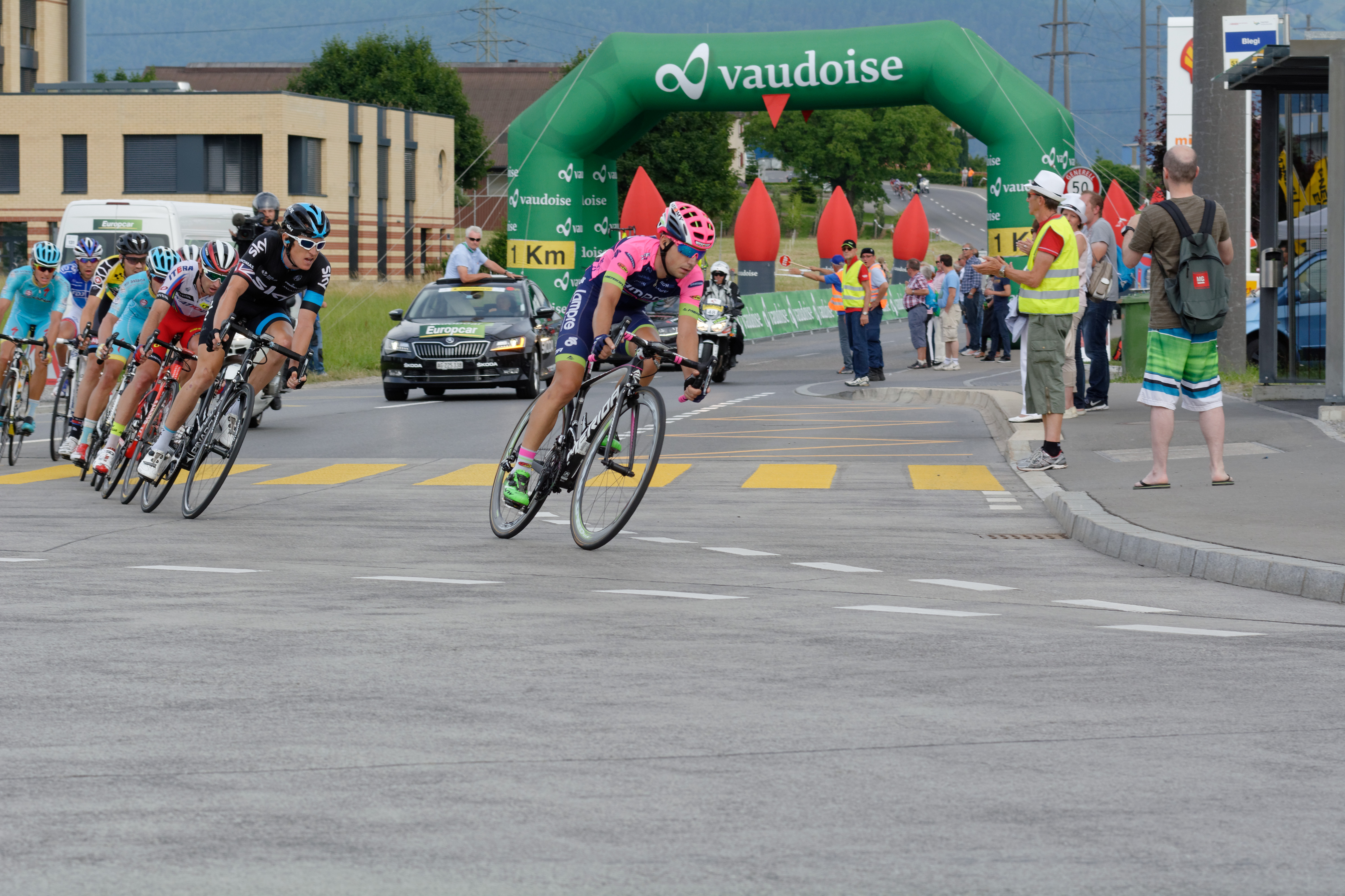 D71_0408_DxO